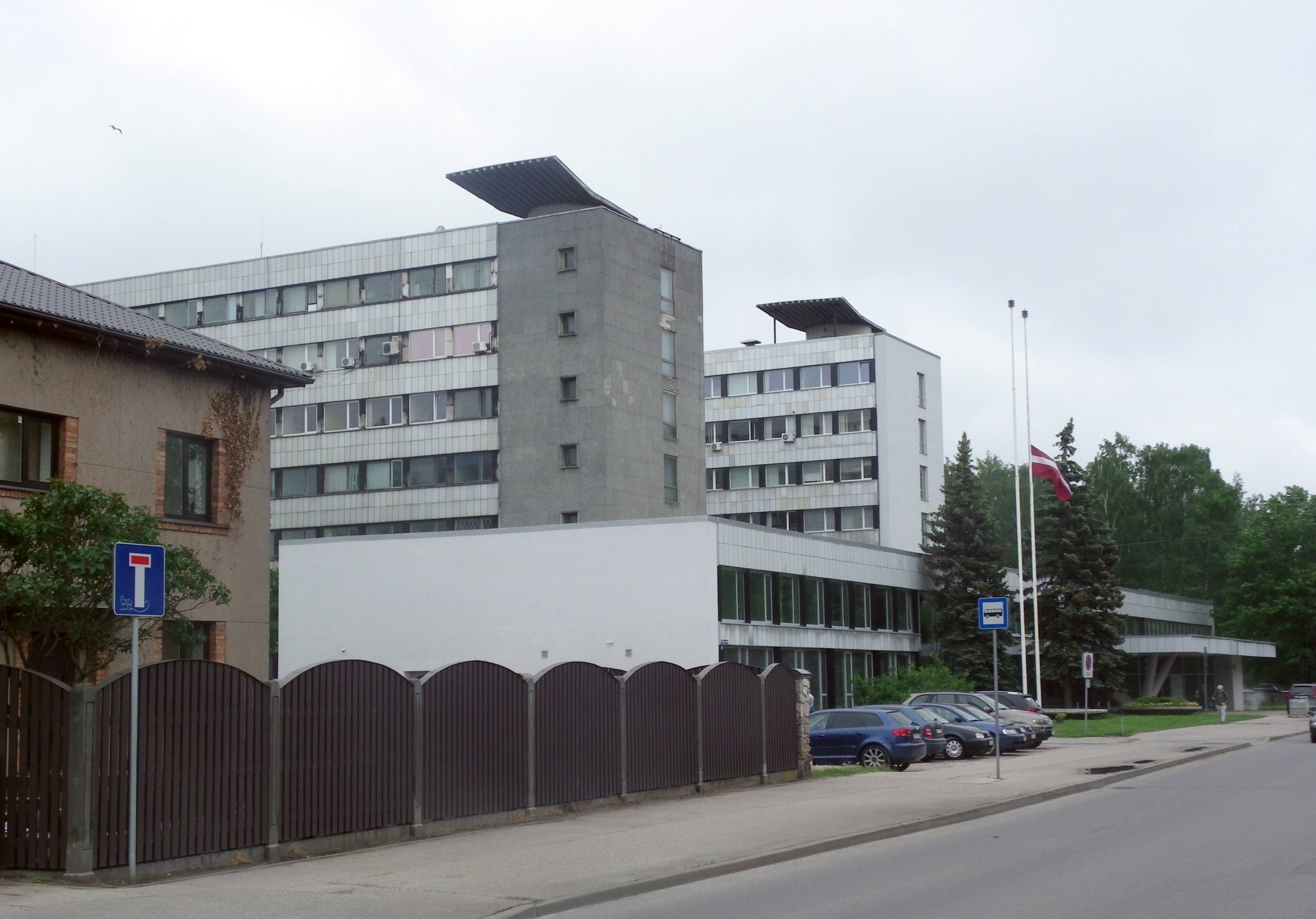 Dzērbenes iela Rīgā